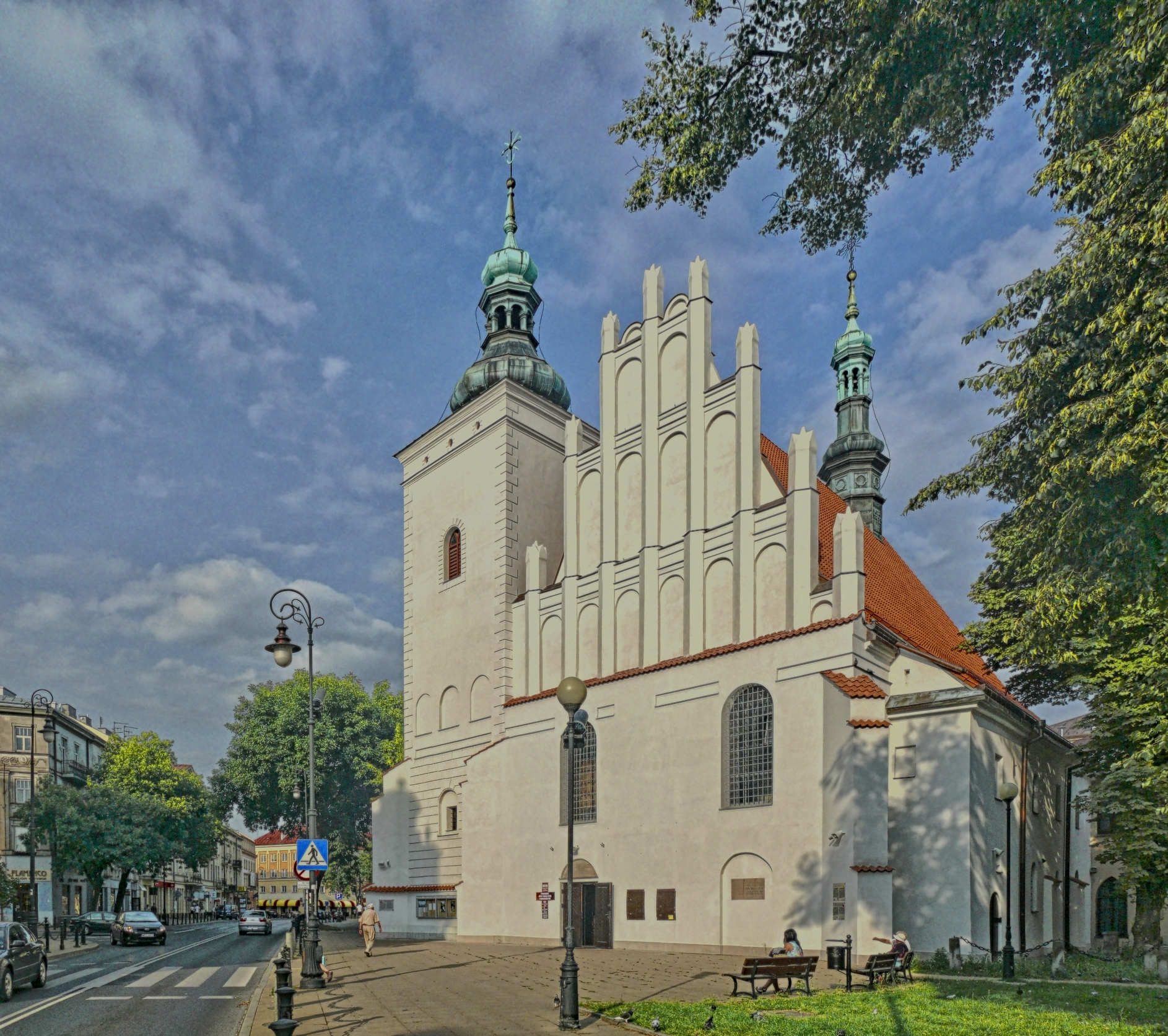 Kościół Rektoralny Wniebowzięcia Najświętszej Marii Panny Zwycięskiej lub Kościół Powizytkowski vel Pobrygidkowski – jeden z najcenniejszych zabytków gotyku i renesansu w Lublinie.